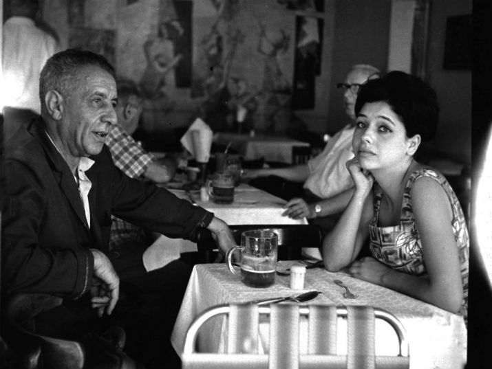 נתן אלתרמן יחד עם בתו תרצה אתר בקפה "כסית". י